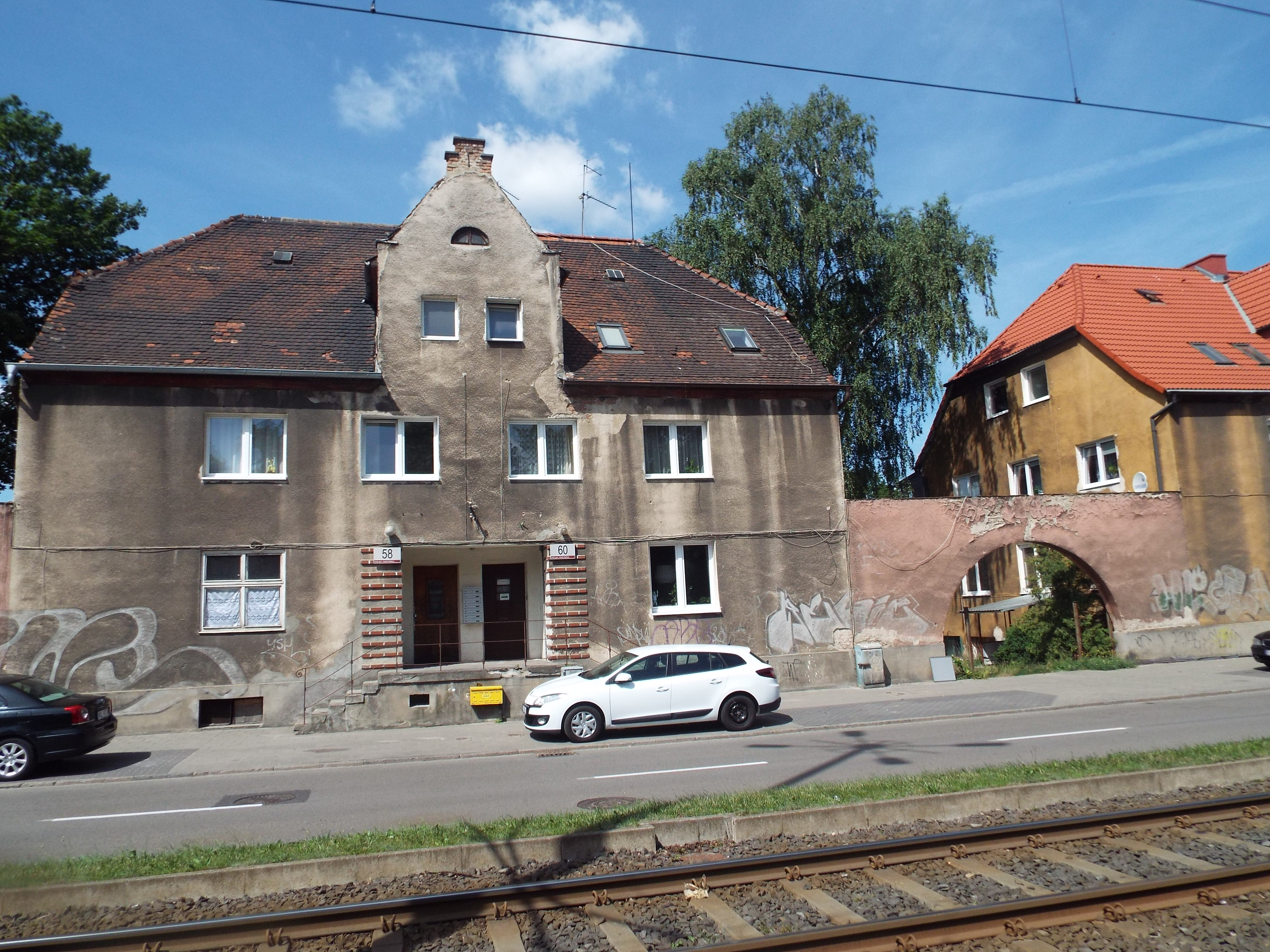 Gdańsk Wrzeszcz, al. gen. Józefa Hallera - dom mieszkalny